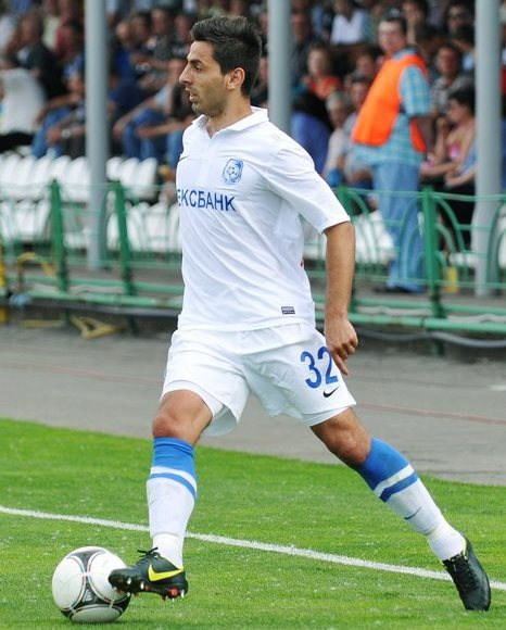 Крісті Вангєлі - албанський футболіст, під час виступів за ФК Чорноморець